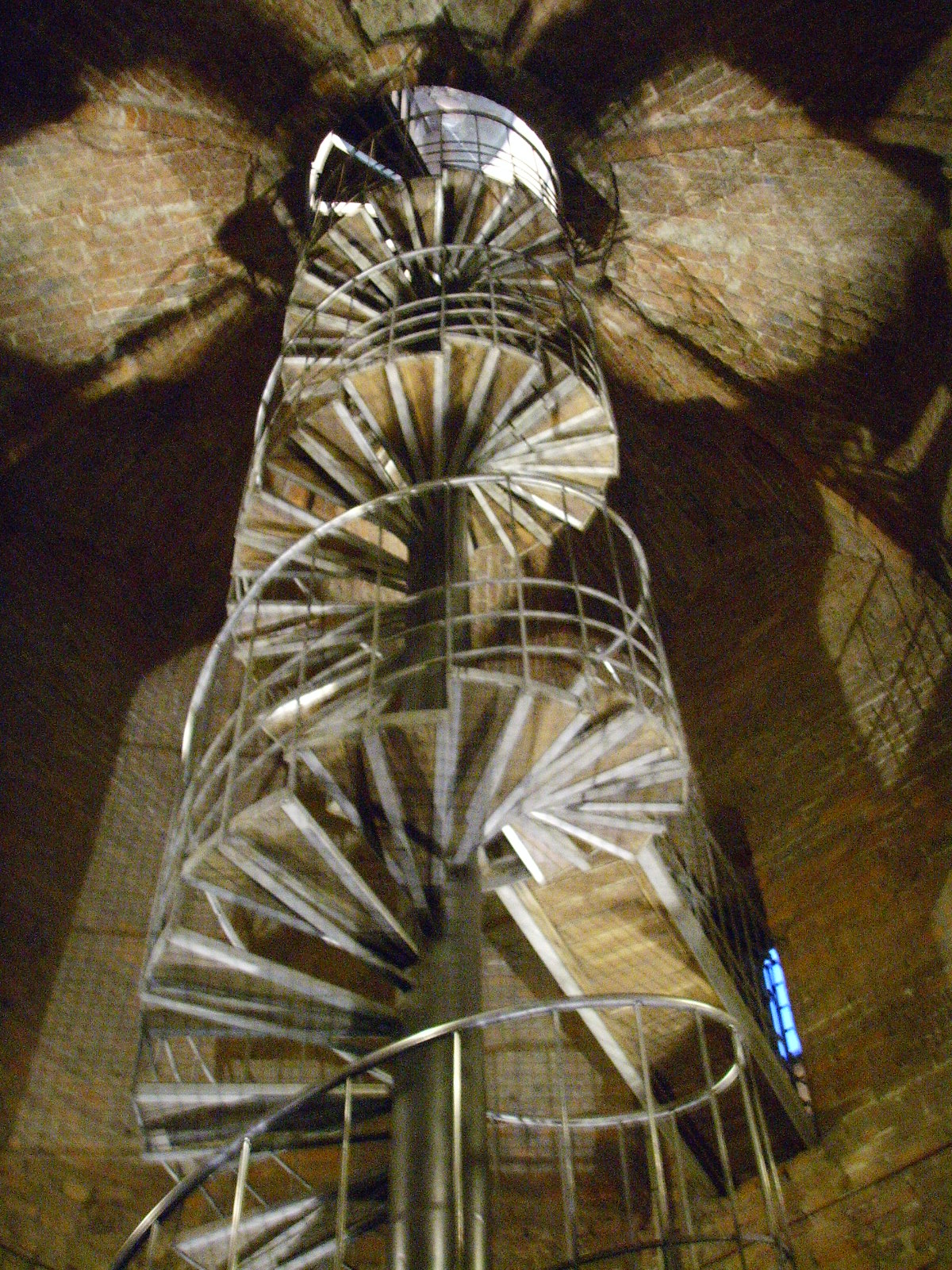 Cremona, torrazzo interno 02 scala a chiocciola